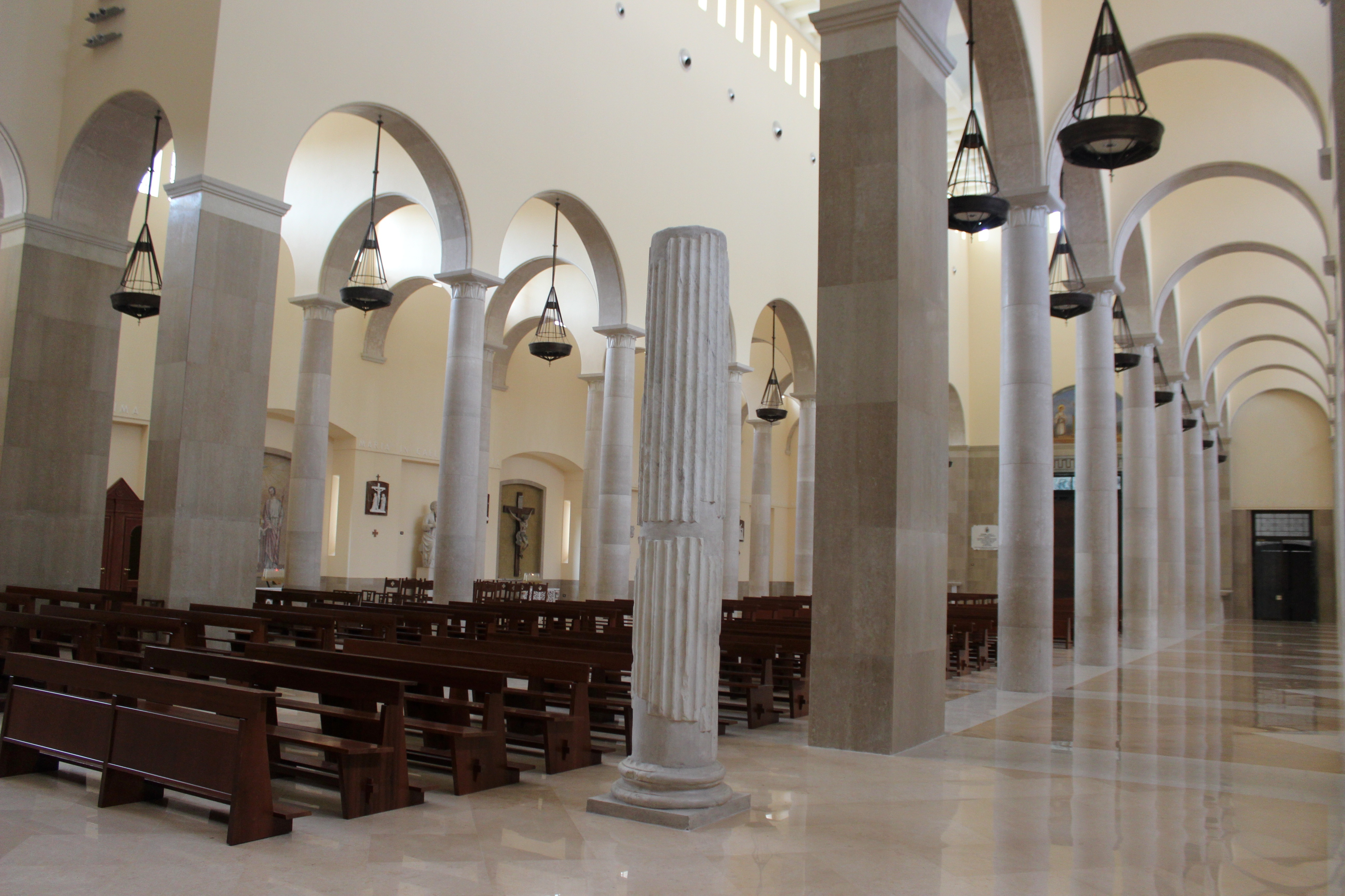 Catedral de Benevento